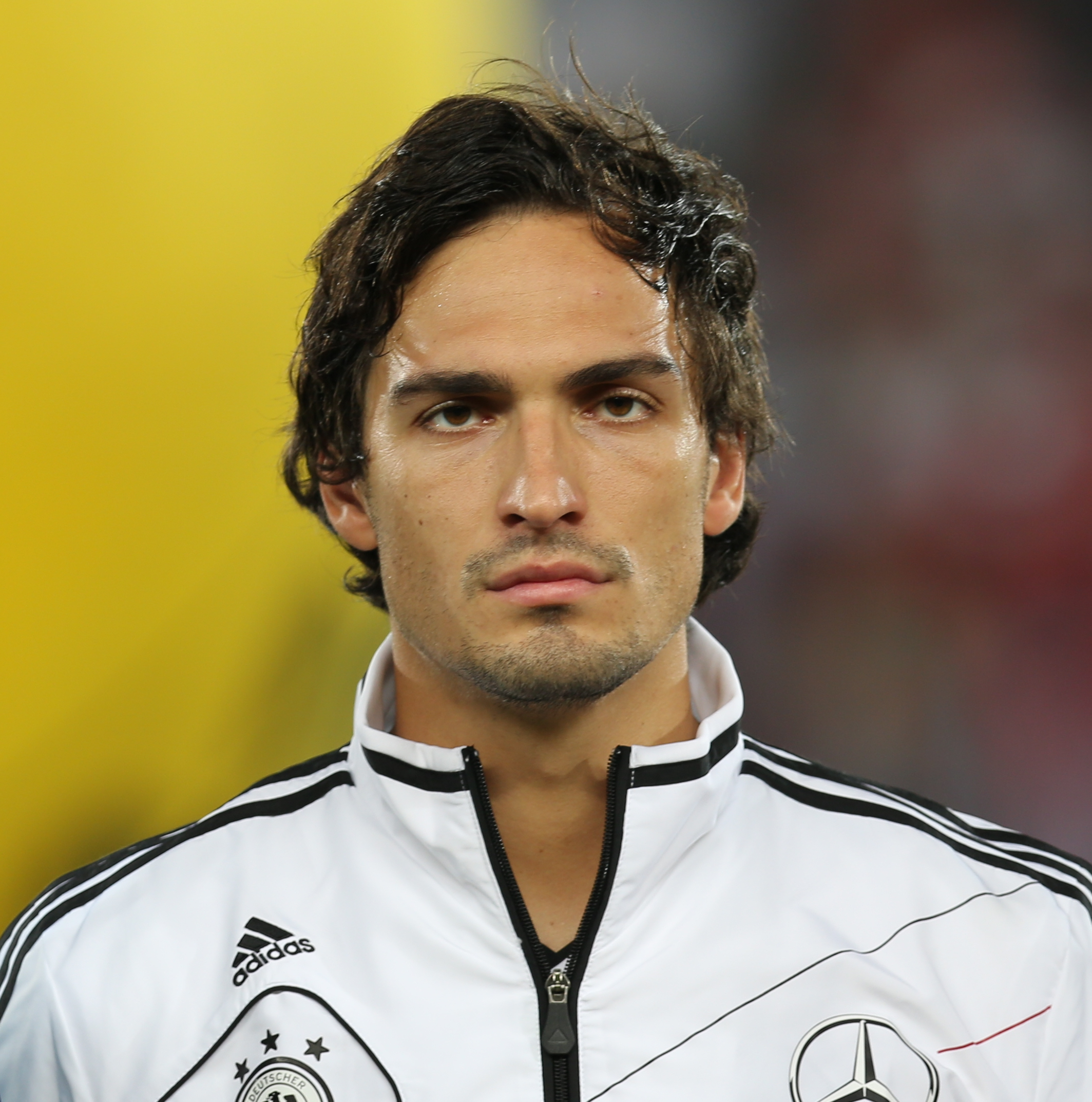 Fußball-Weltmeisterschaft 2014/Qualifikation (UEFA), Gruppe C, 11. September 2012, Österreich gegen Deutschland im Wiener Ernst-Happel-Stadion. The making of this work was supported by Wikimedia Austria. For other files made with the support of Wikimedia Austria, please see the category Supported by Wikimedia Österreich.